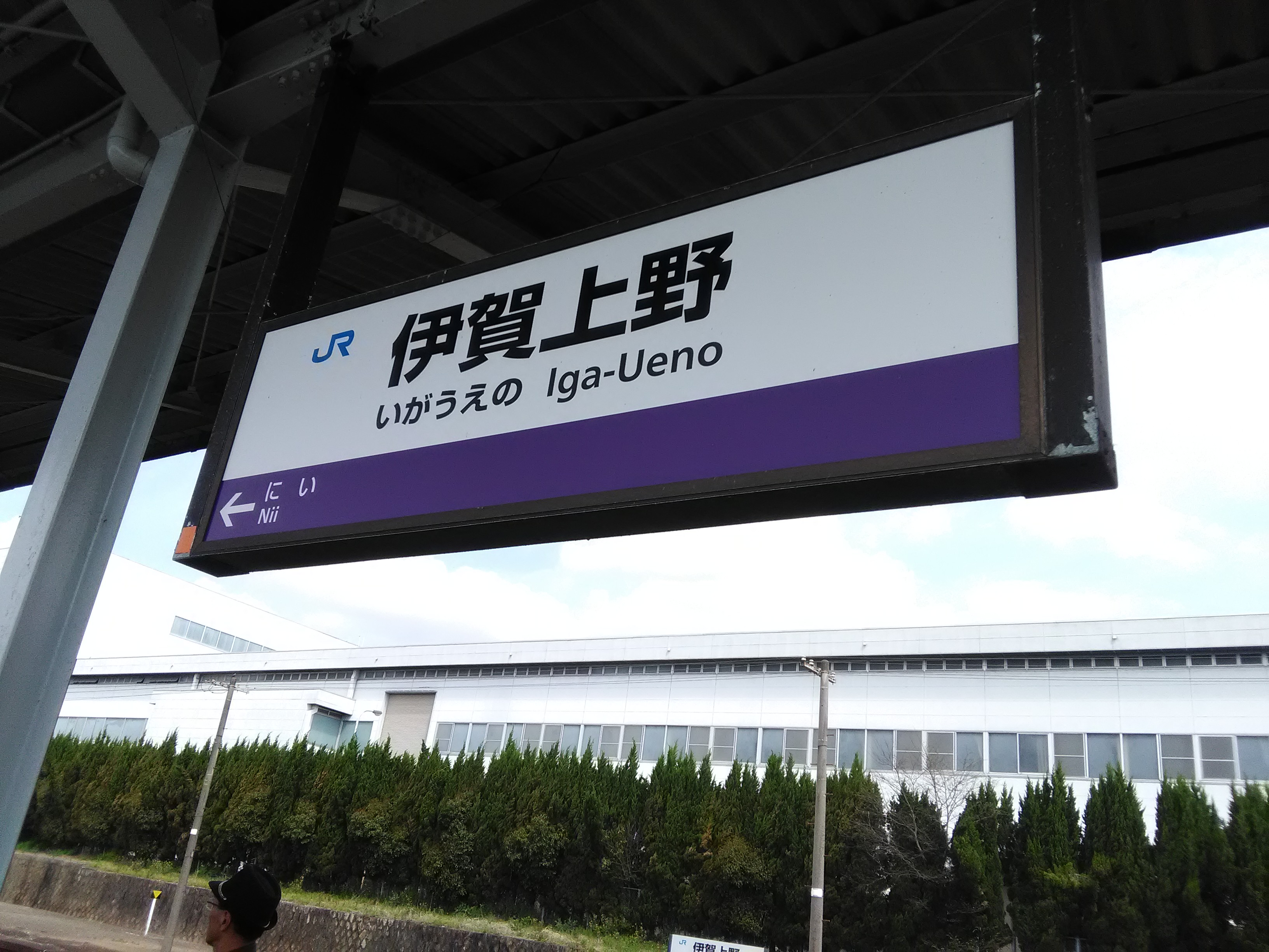 伊賀上野駅1番のりばの駅名標